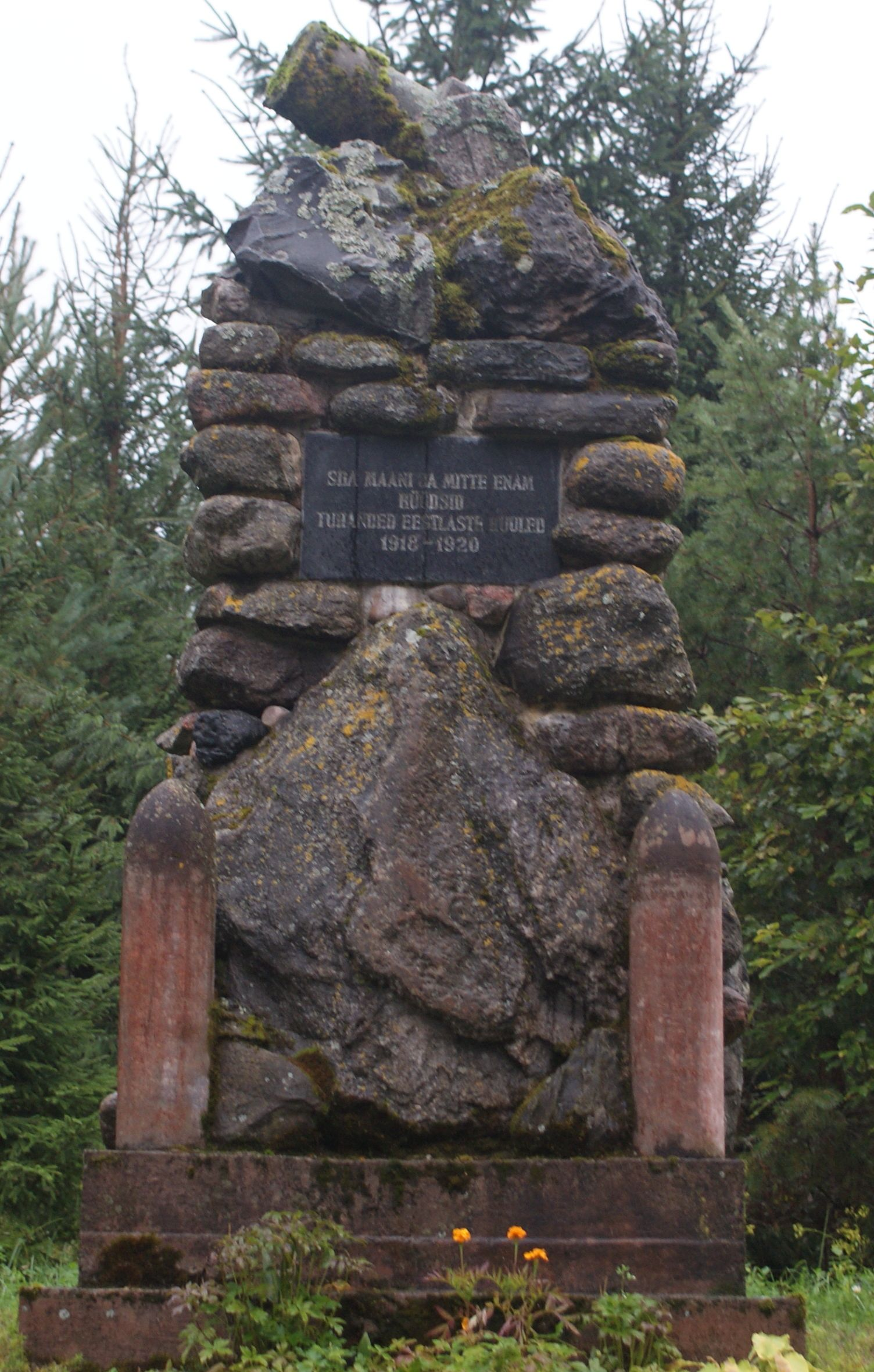 Vabadussõja Voose lahingu mälestussammas